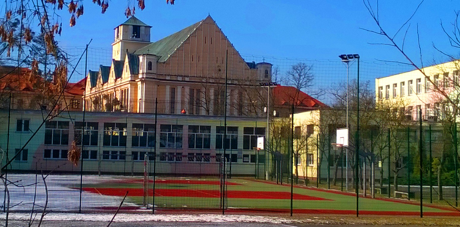 Zespół Szkół Ekonomicznych w Toruniu1